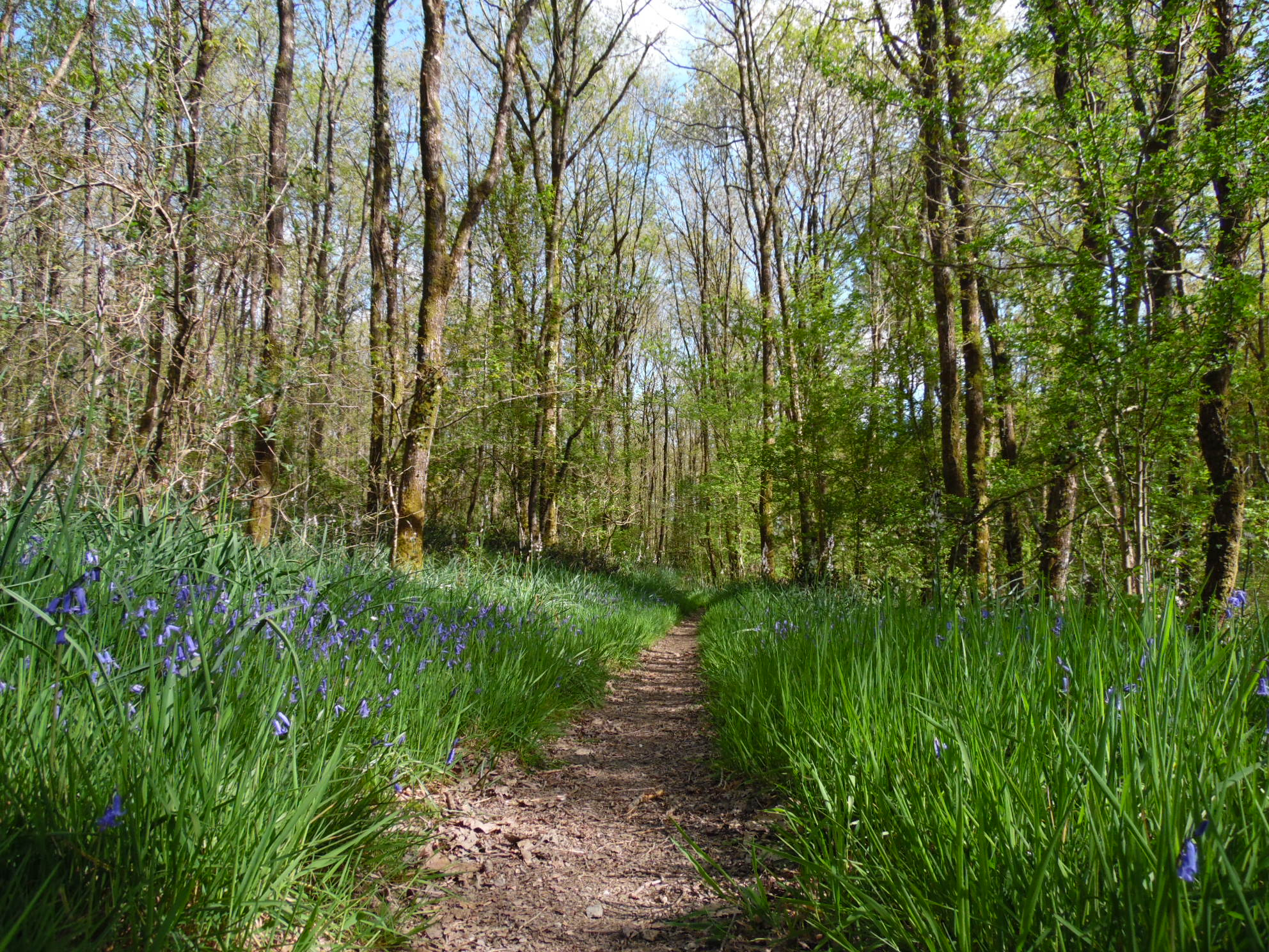 Un chemin forestier dans la forêt de Mervent-Vouvant